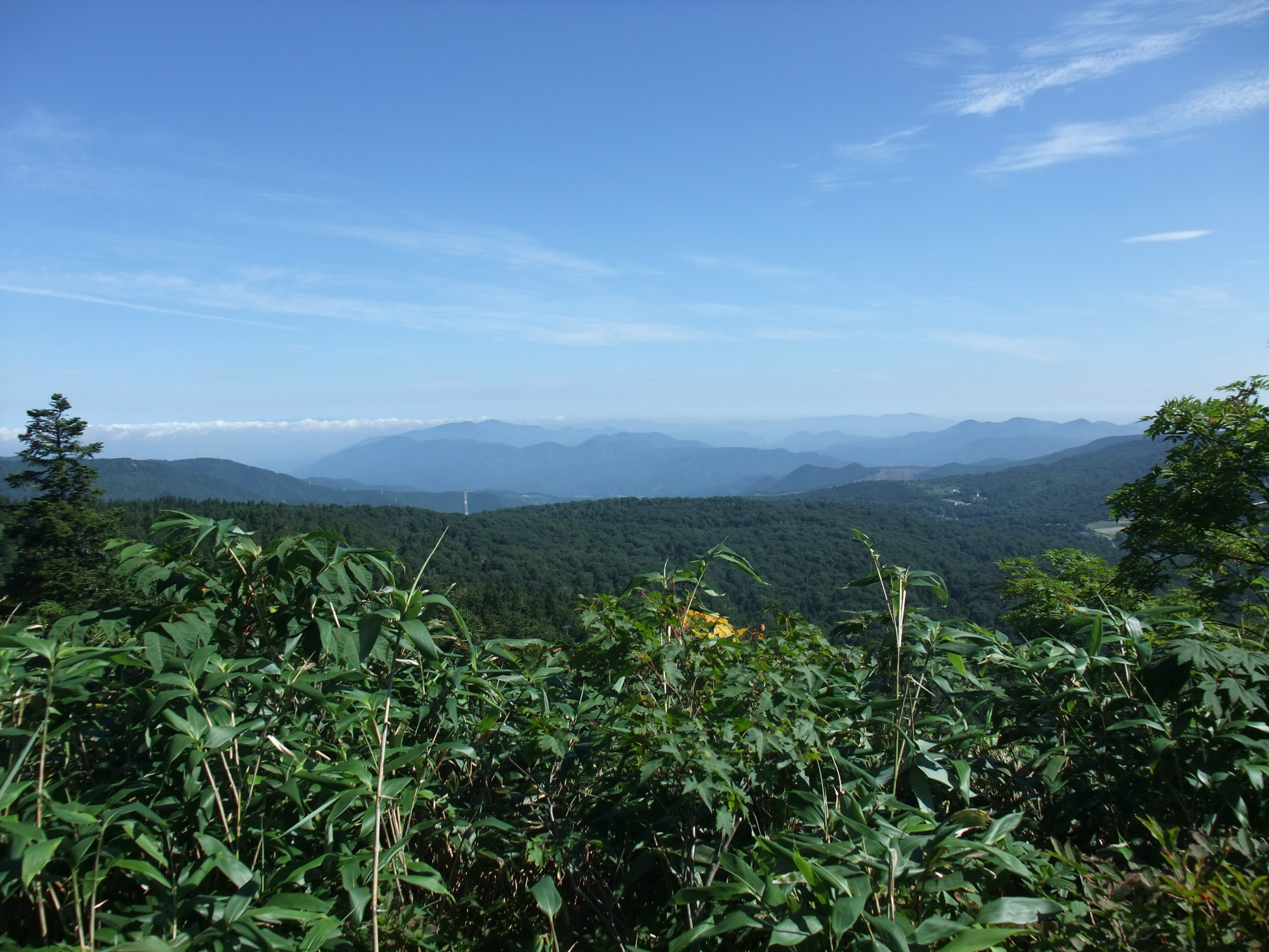 国見台(八幡平)からの眺め。中央やや左の山は五の宮岳